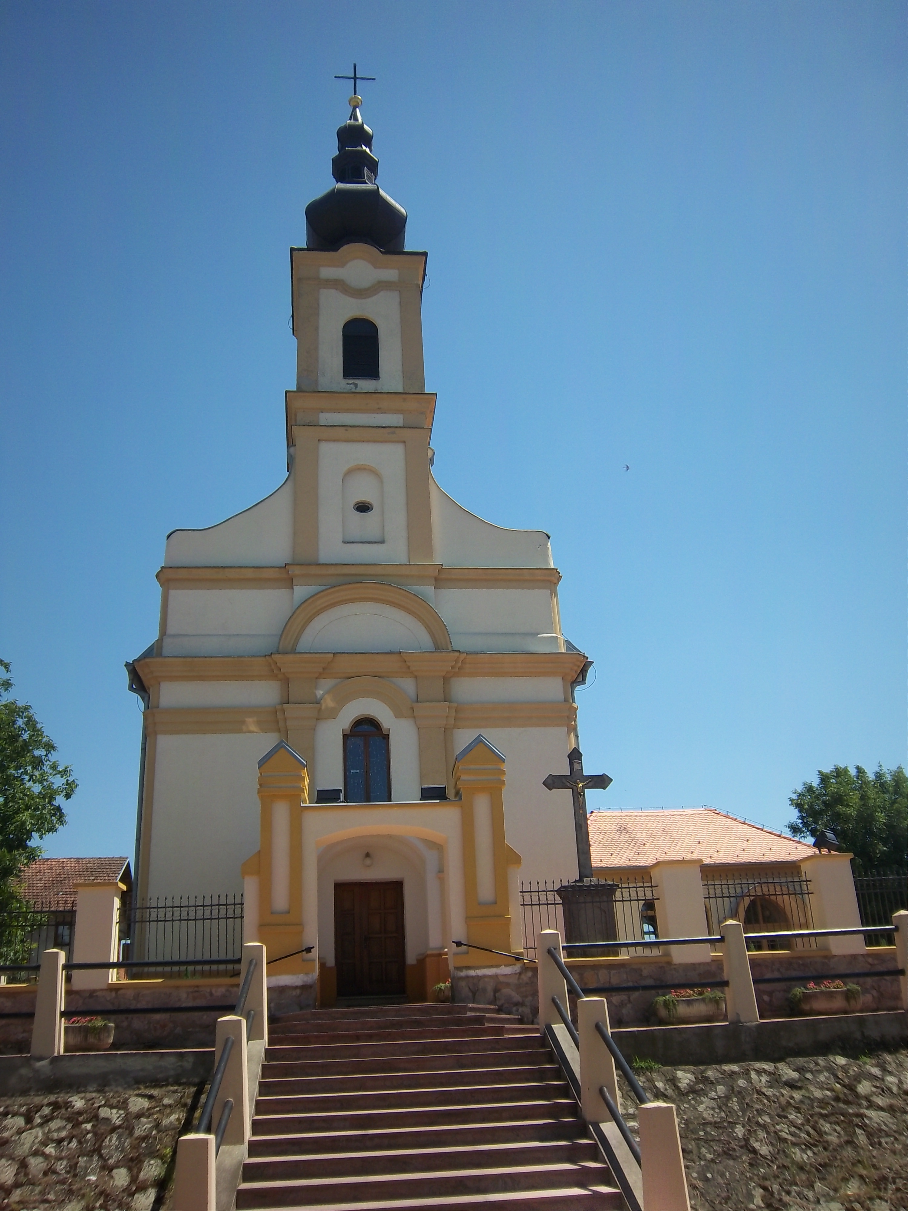 Srpskohrvatski / српскохрватски: Katolička crkva u Slakovcima, Republika Hrvatska